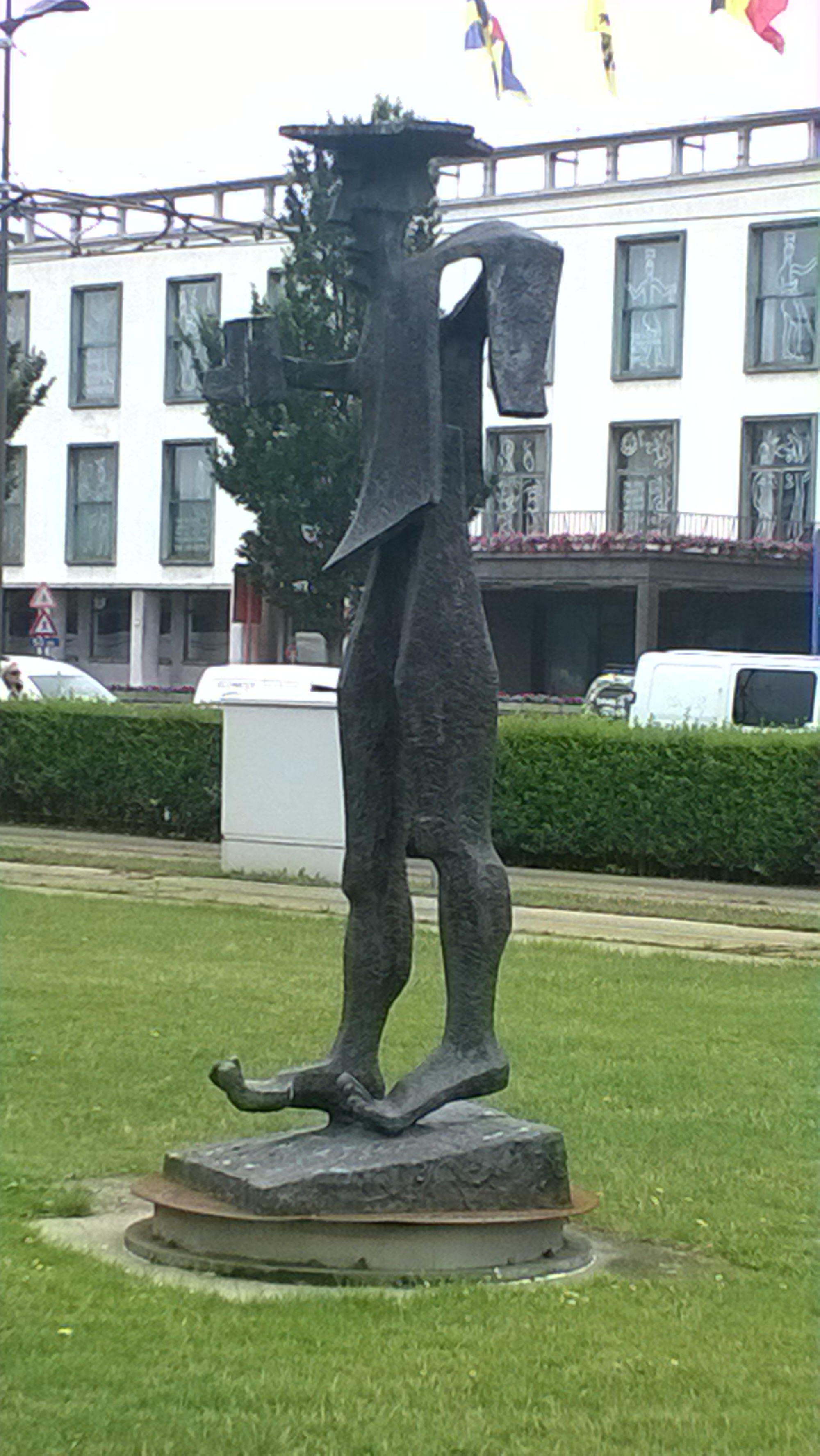 Standbeeld voor het stadhuis van Oostende